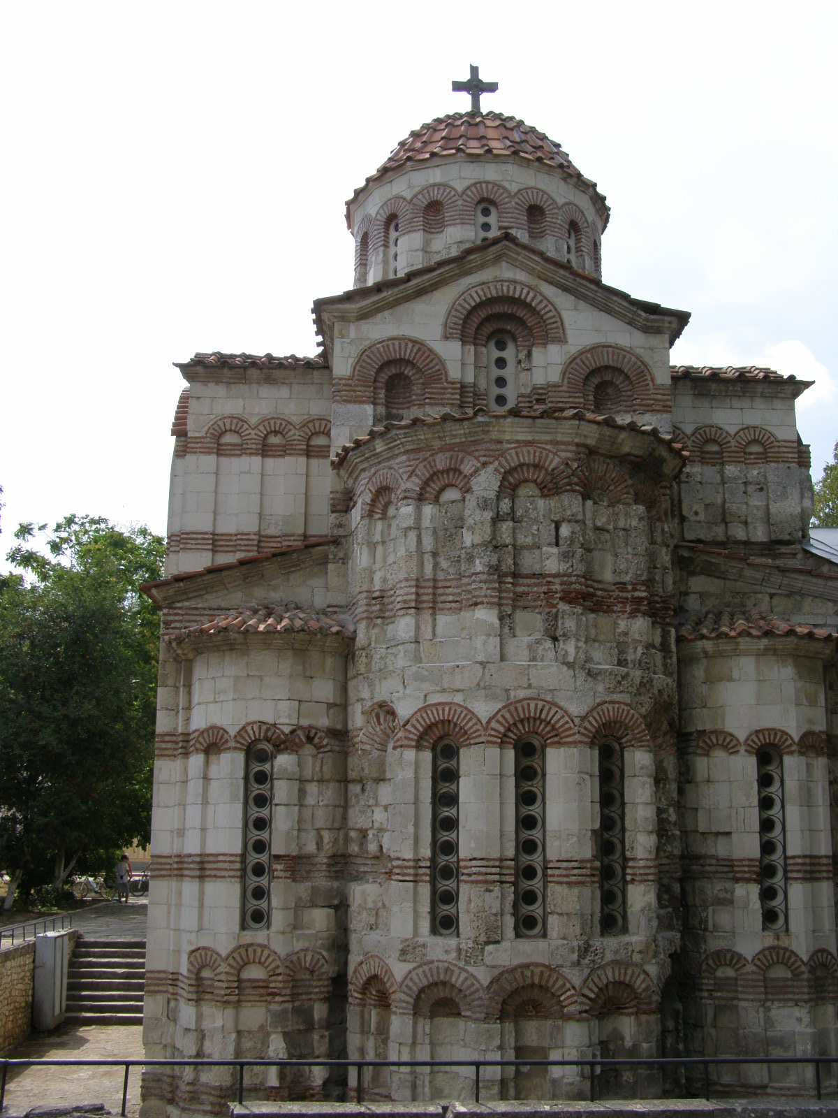 Церква Івана Предтечі в Керчі